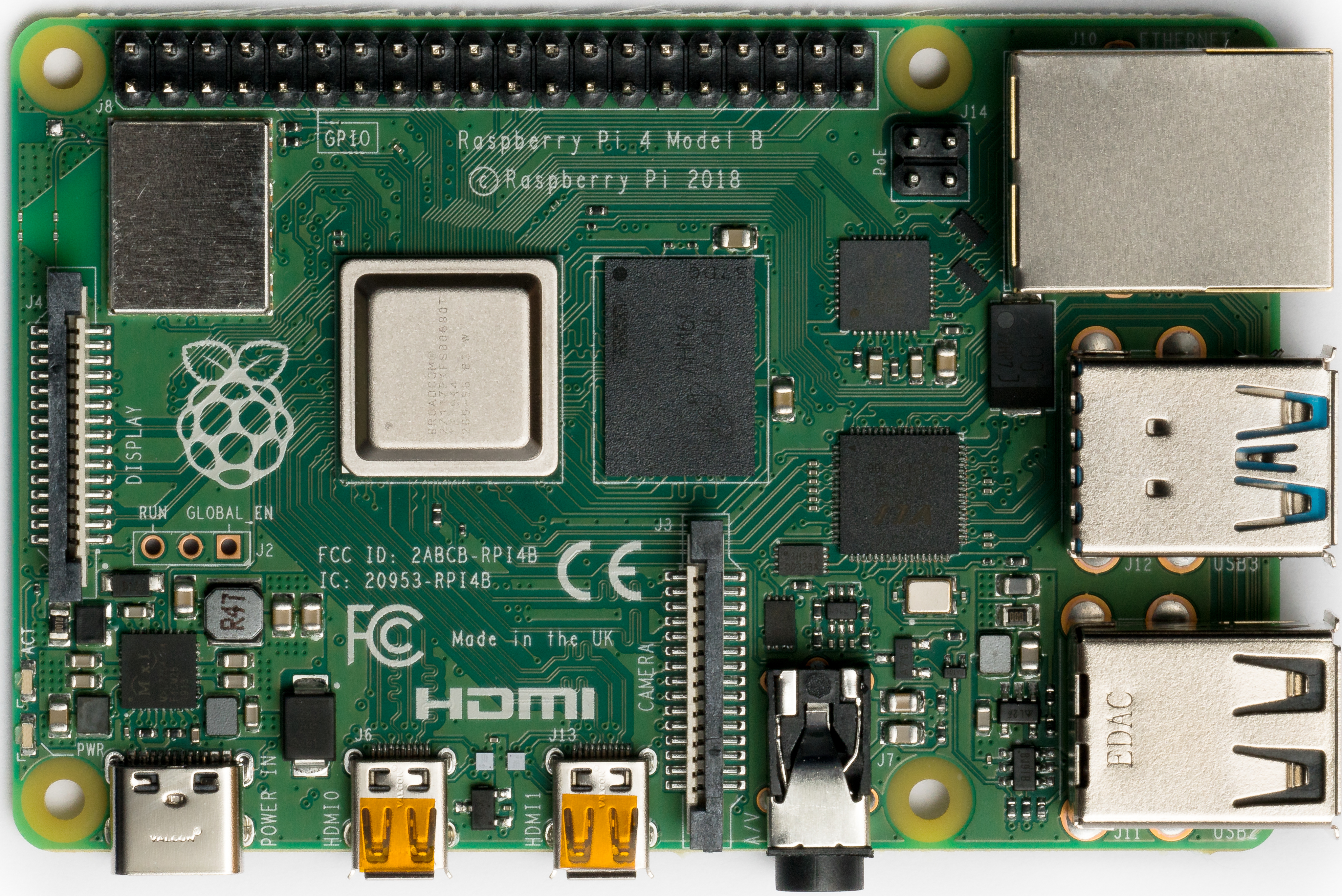 Raspberry Pi 4 Model B von Oben.